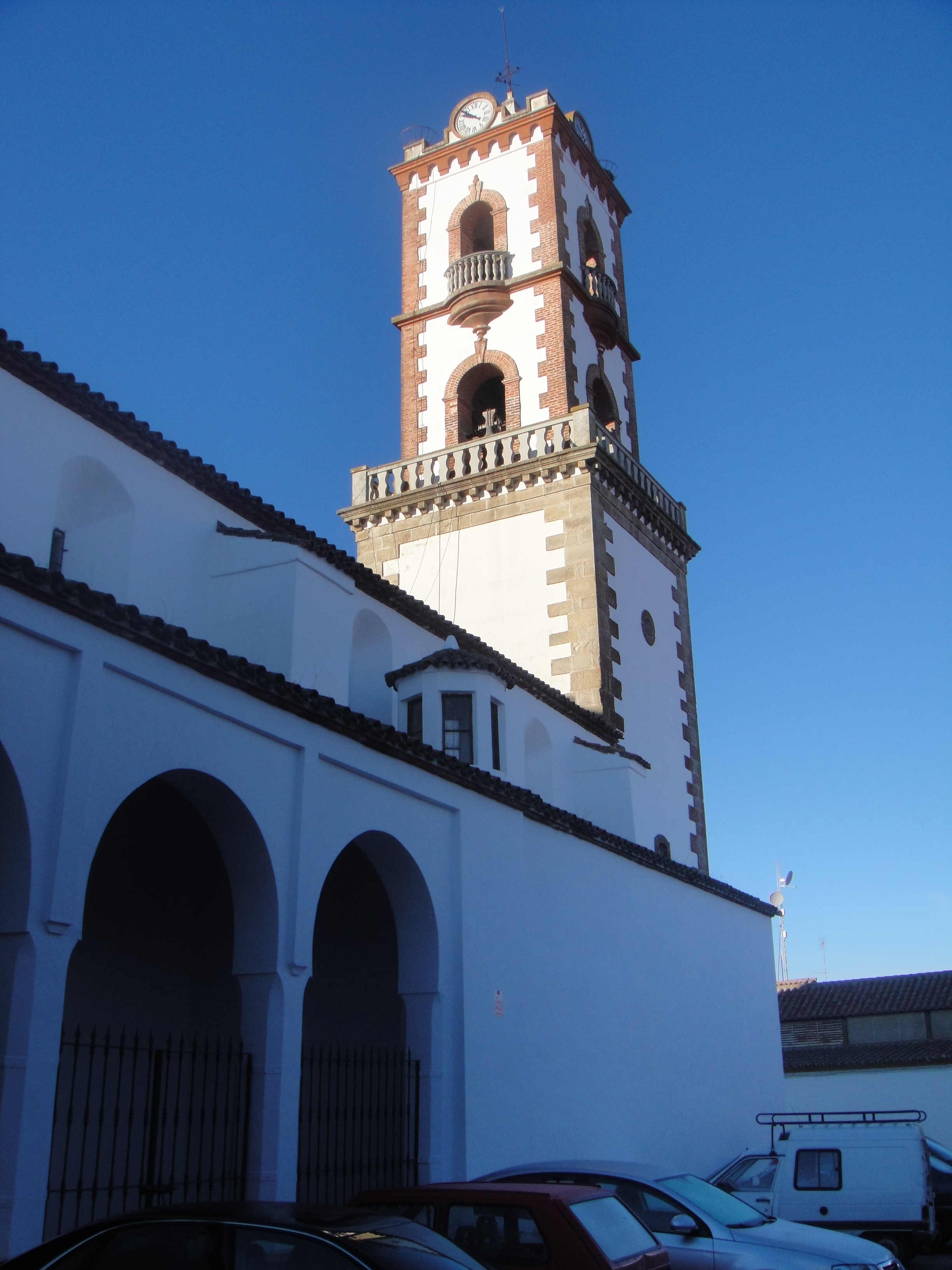 Torre de la iglesia de Nuestra Señora del Castillo de Fuente Obejuna, provincia de Córdoba, (España).